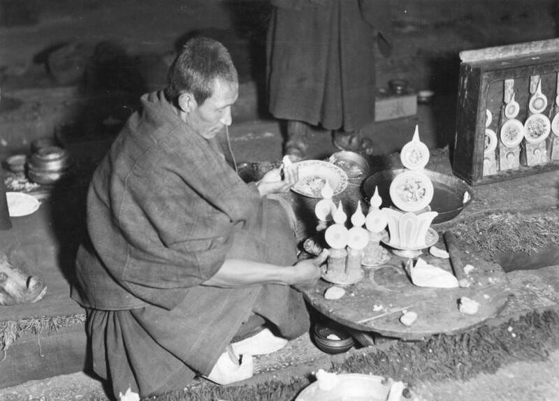 Tibetexpedition, Mönch mit Butterfiguren Lhasa-Neujahr, Lama beim Formen der Butterfiguren (Dormas). Kloster Sera